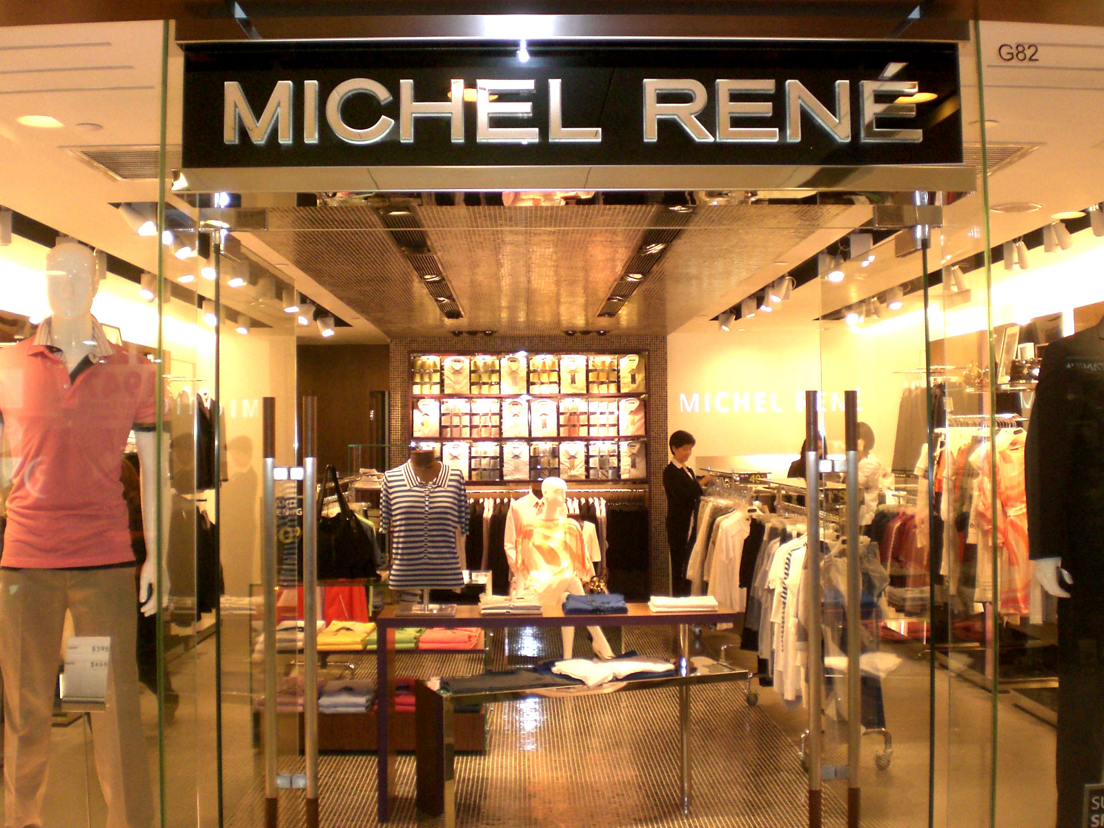 商店馬獅龍，MICHEL RENE@九龍灣德福廣場